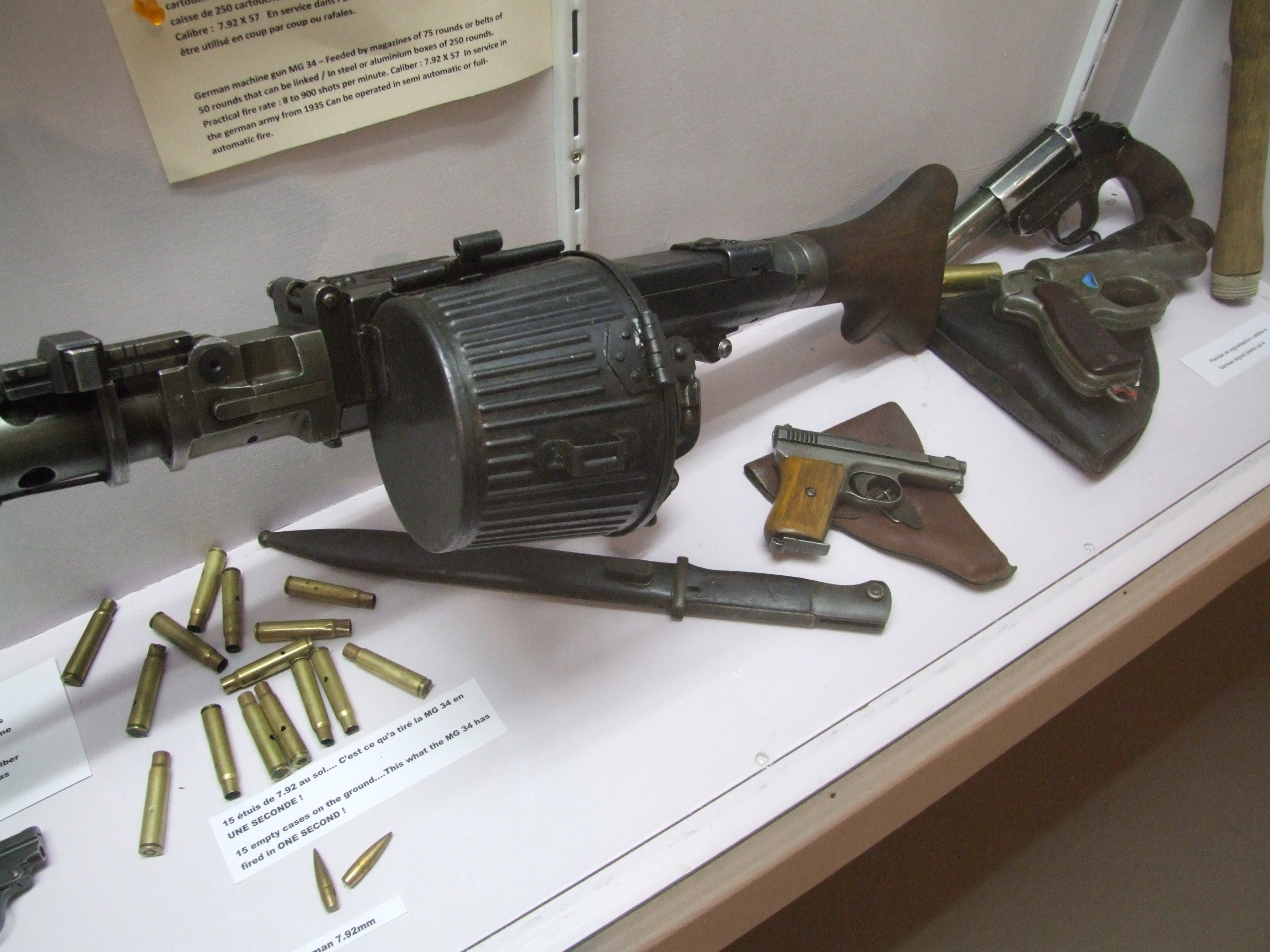 deutsches Maschinengewehr 34 (MG 34) im Mémorial du Souvenir, Dünkirchen